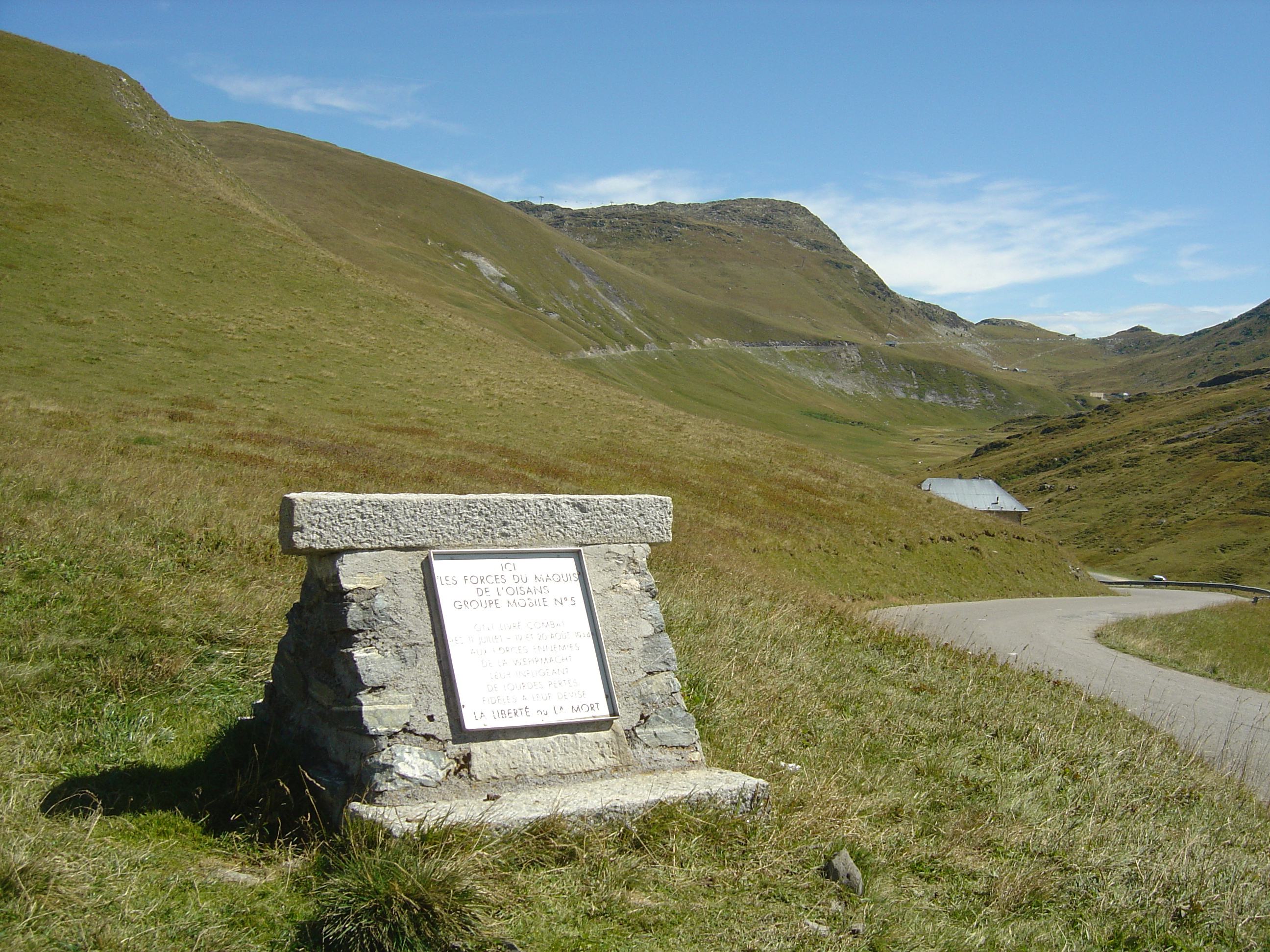 Panneau en mémoire de la résistance (5eme groupe mobile de l'Oisans) au col du Glandon. Au fond à droite le col de la croix de Fer